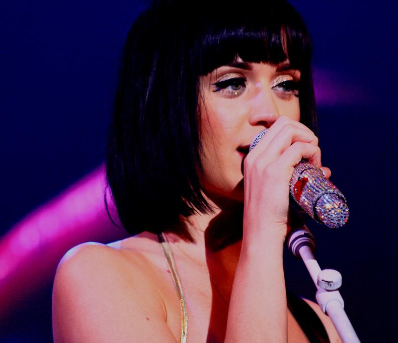 Show de Katy Perry em Michigan em 27 de Março de 2009.